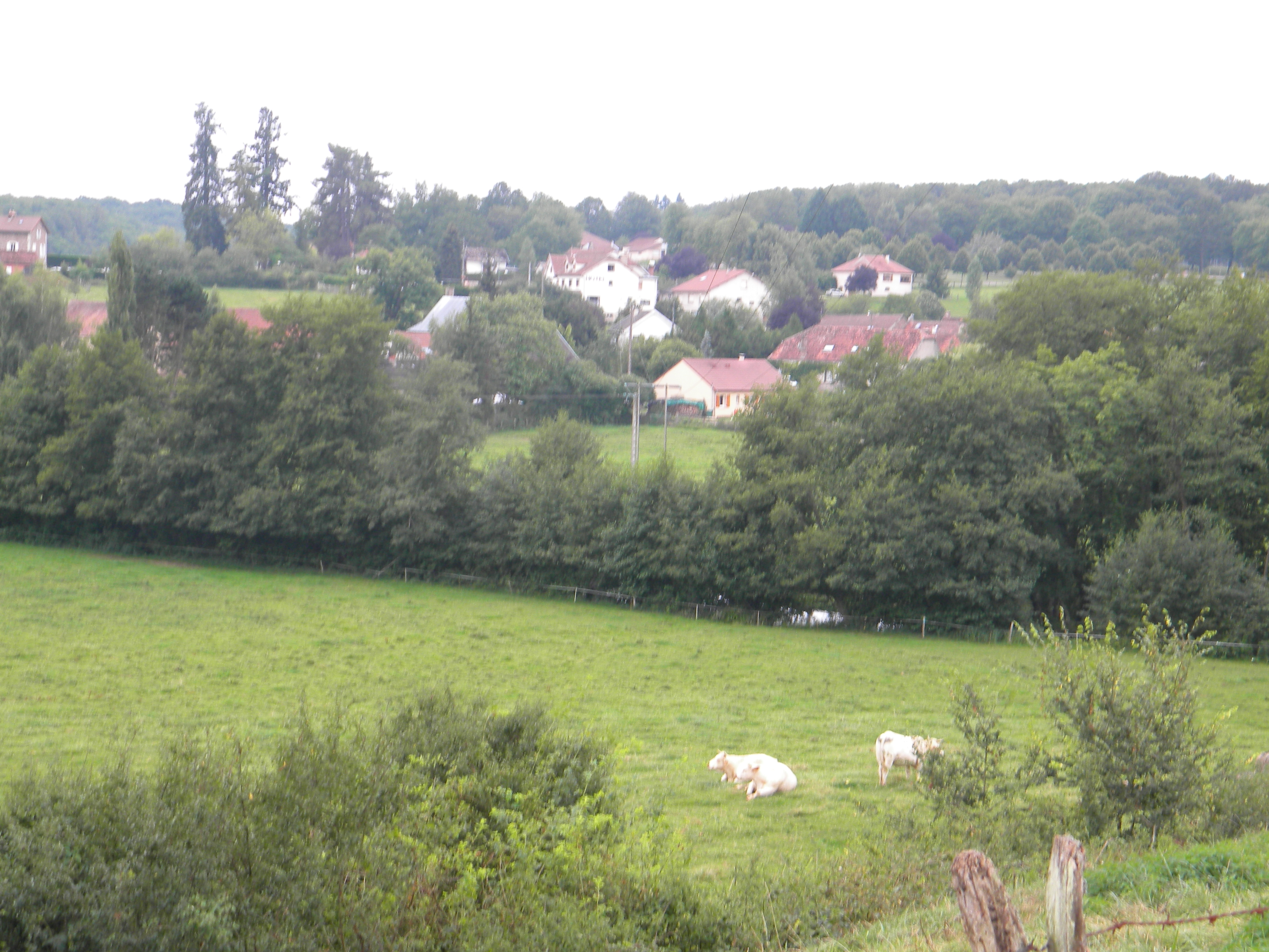 Pont-et-Massène